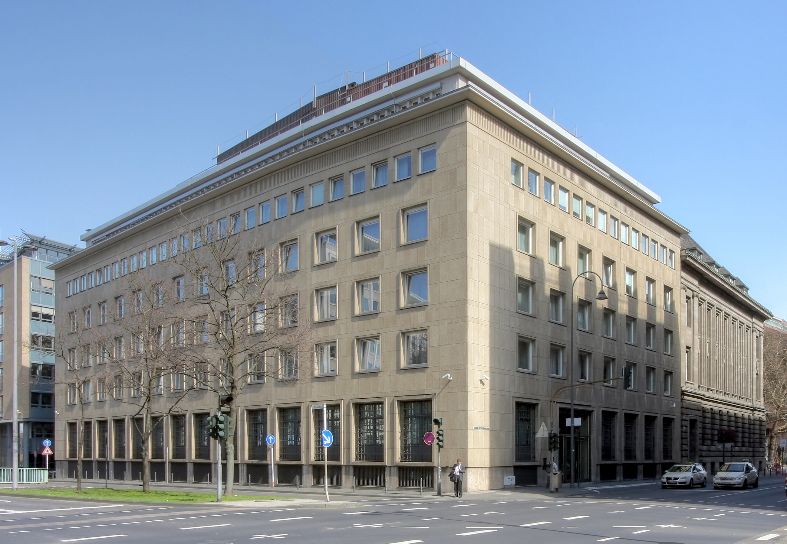 Denkmalgeschütztes Gebäude von Sal. Oppenheim, Unter Sachsenhausen 4, Köln. Ecke Tunisstraße: Architekt: Fritz August Breuhaus de Groot. Baujahr: 1952/53